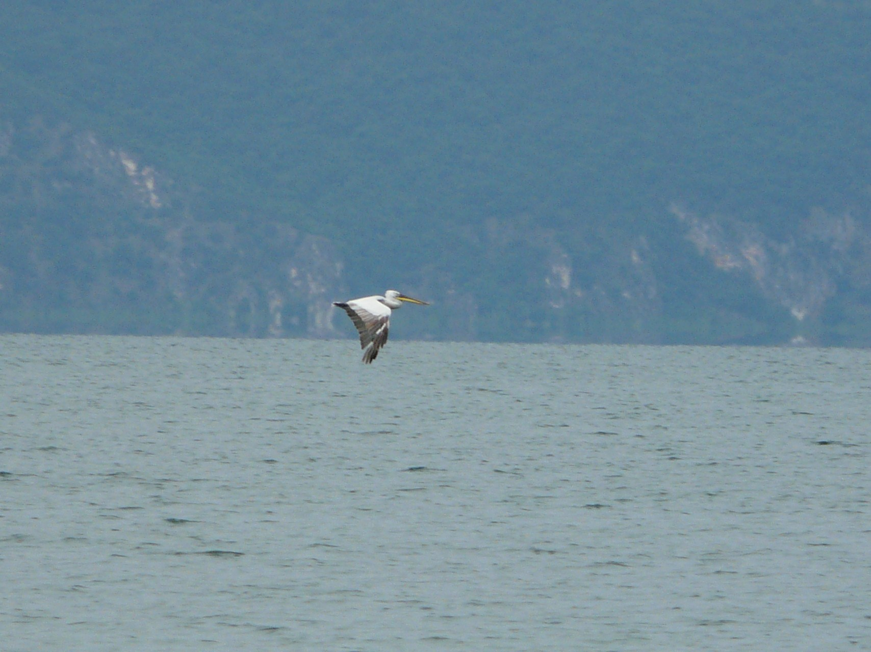 Dalmatian Pelican Pelecanus crispus, Lake Prespa, Macedonia